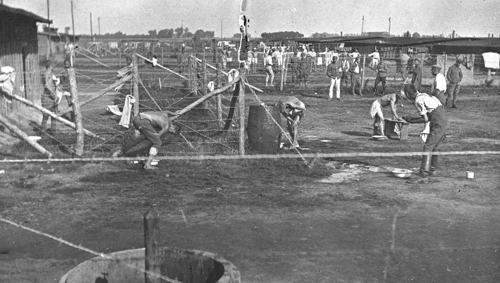 Legioniści podczas prania bielizny.